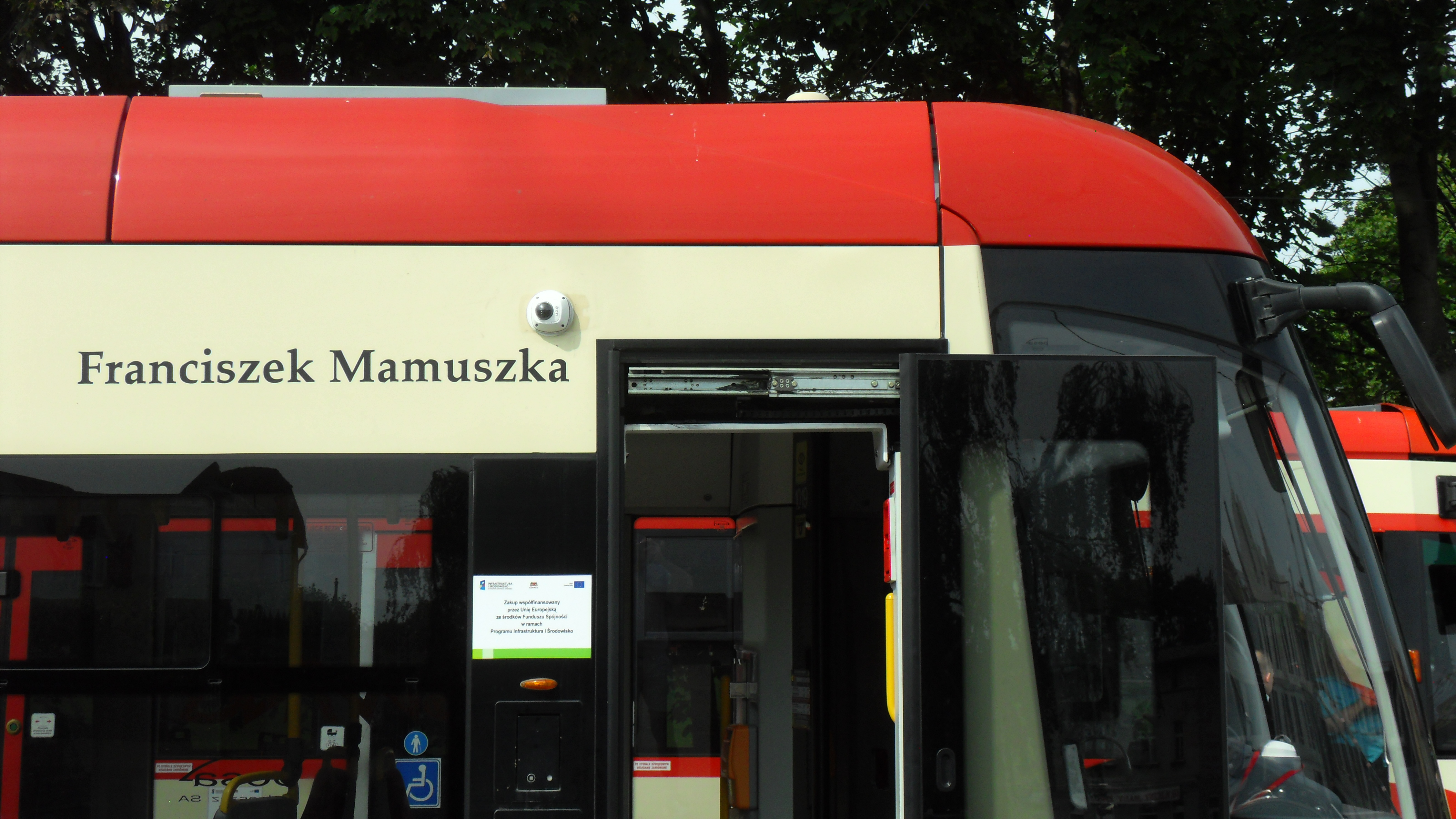 Gdańsk, tramwaj Pesa Swing 120NaG nr 1019 im. gdańszczanina Franciszka Mamuszki.